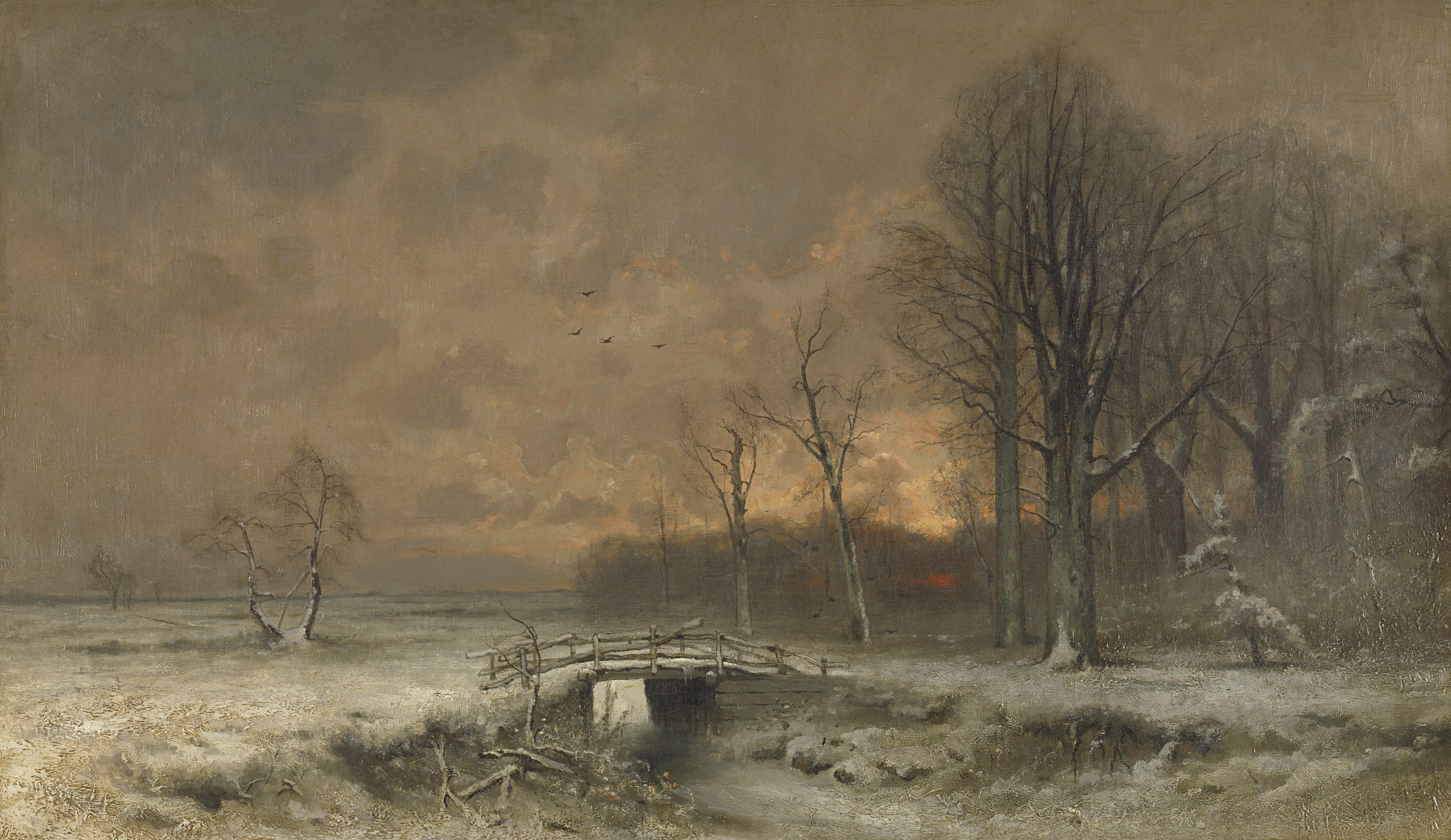 Landschap met houten brug in winter. Rechts een bos, links een weide met hier en daar een boom.